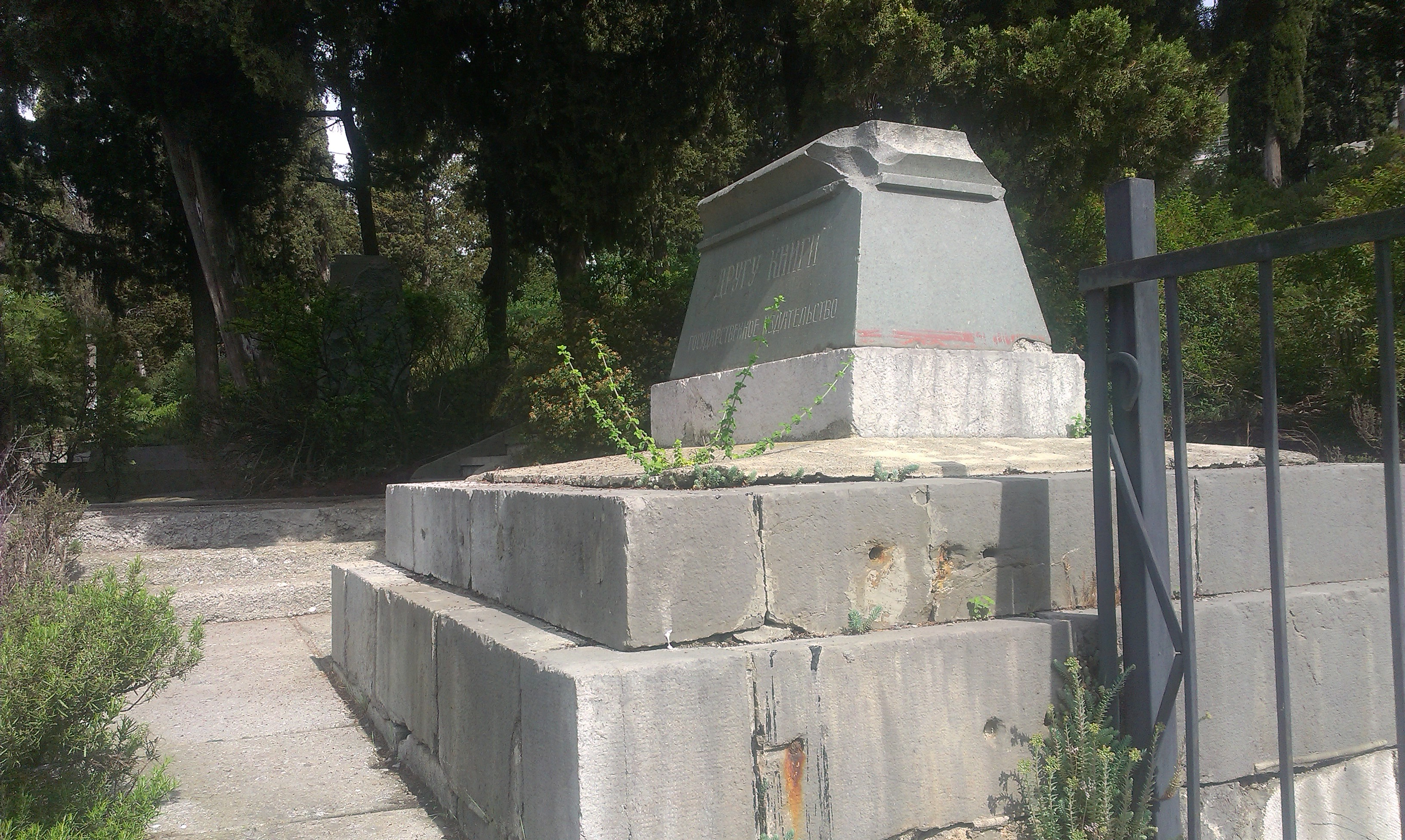 Поликуровский мемориал